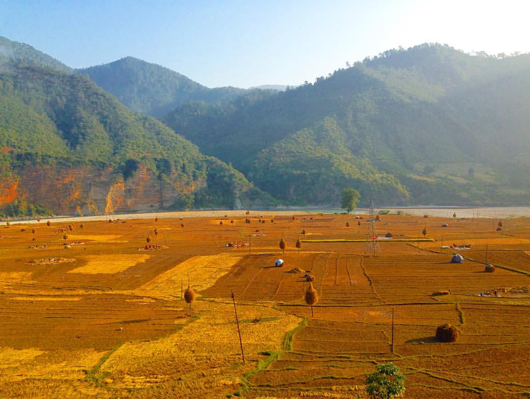 नेपाली: डोटी जिल्लाको खेतका फाँट